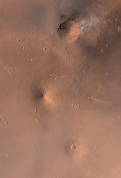 Beschreibung: Vulkane bei Elysium auf dem Mars